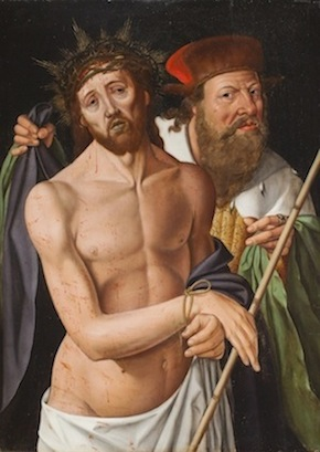 Maître du Saint-Sang - L'homme de douleurs ou Ecce Hommo